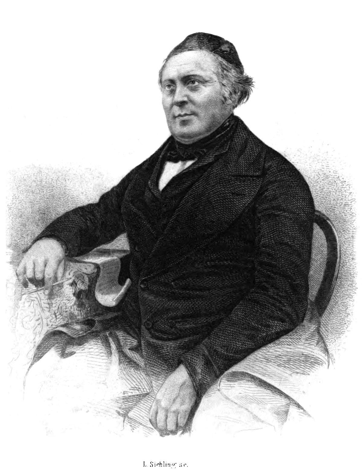 Porträt: W. O. v. Horn. In: W. O. v. Horn’s gesammelte Erzählungen. Neue Volks-Ausgabe. Vollständig in 12 Bänden. J. D. Sauerländer, Frankfurt am Main 1. Band, 1861